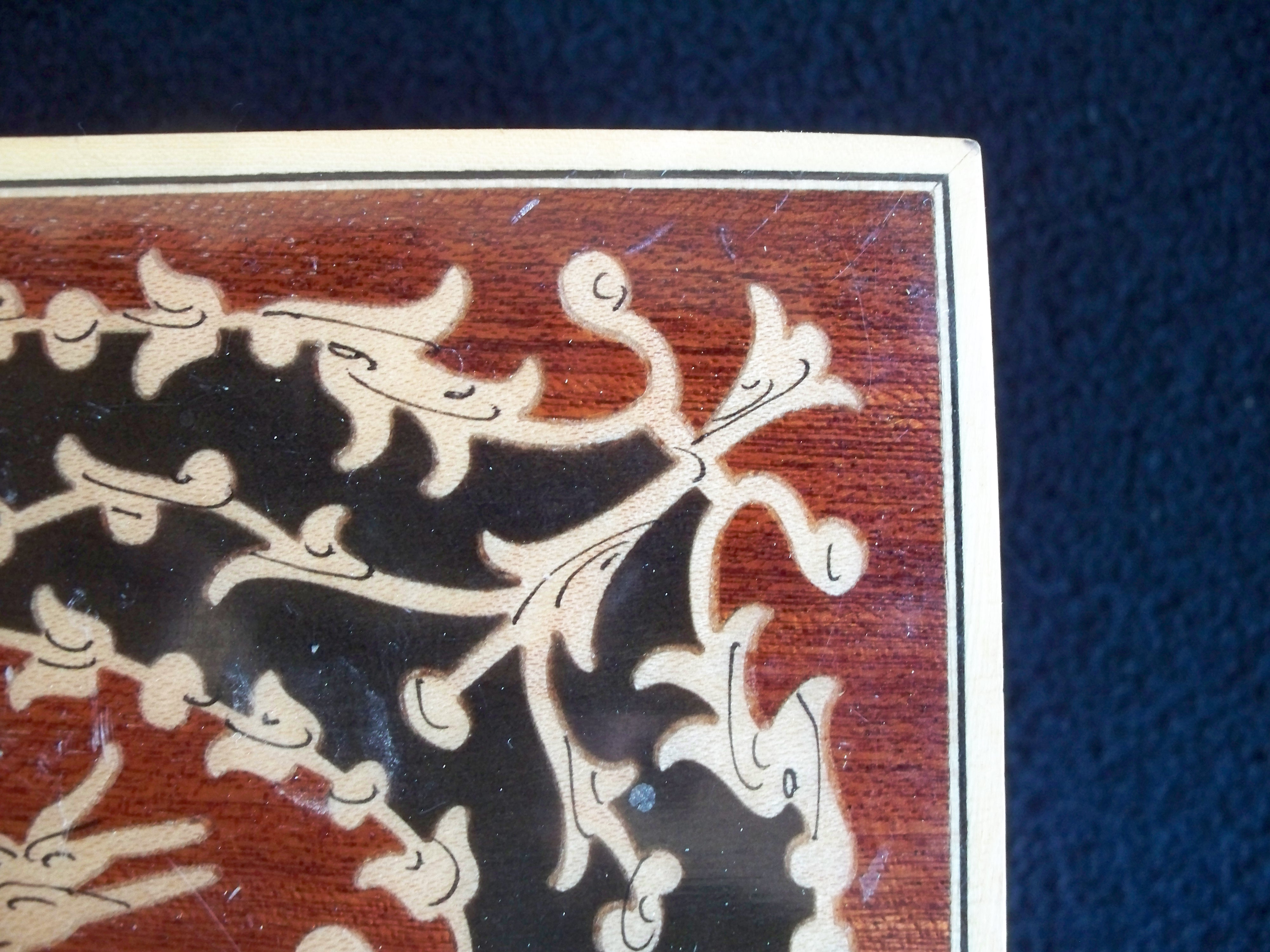 zylka na wieczku kasetki